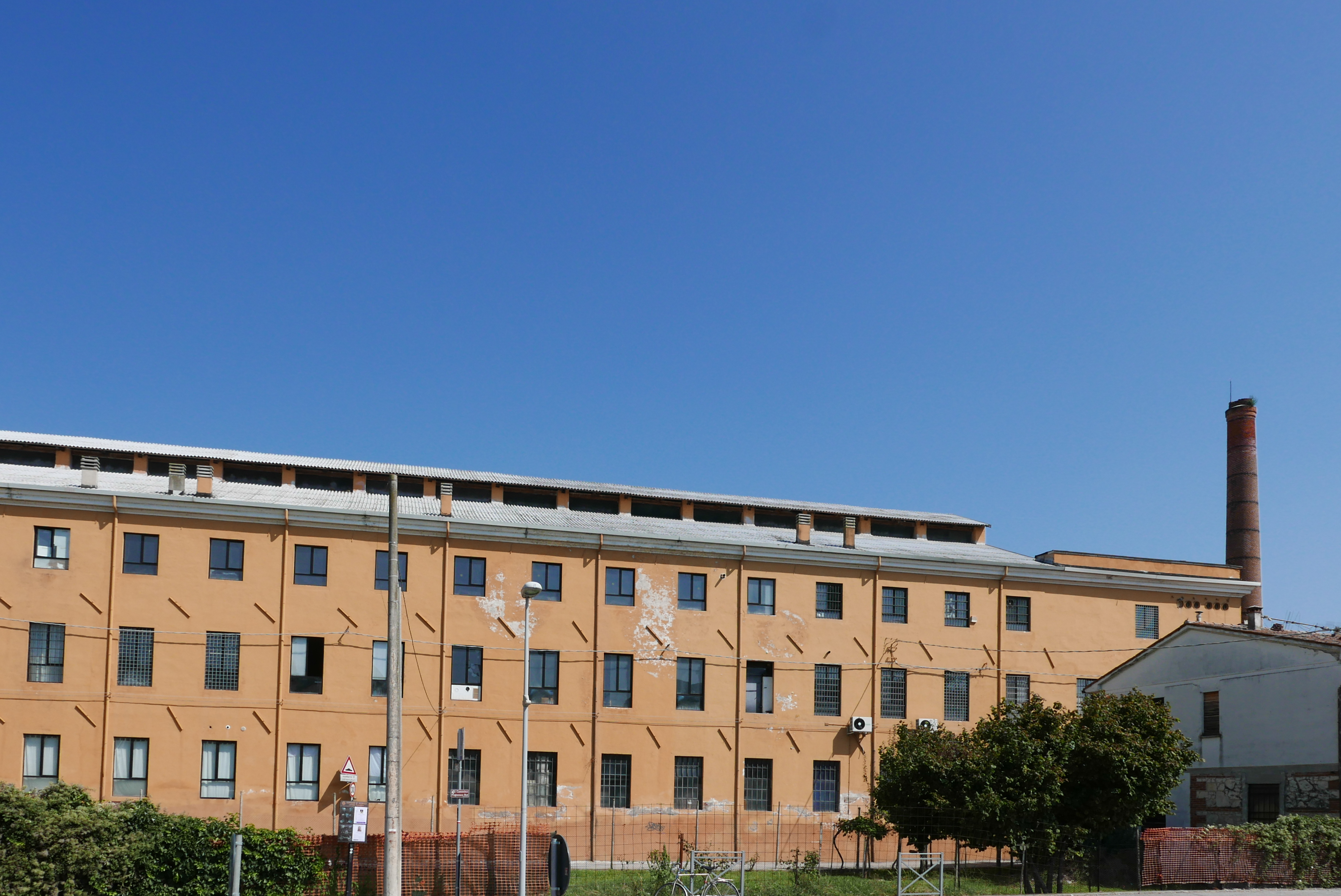 Debba - ex Cotonificio Rossi